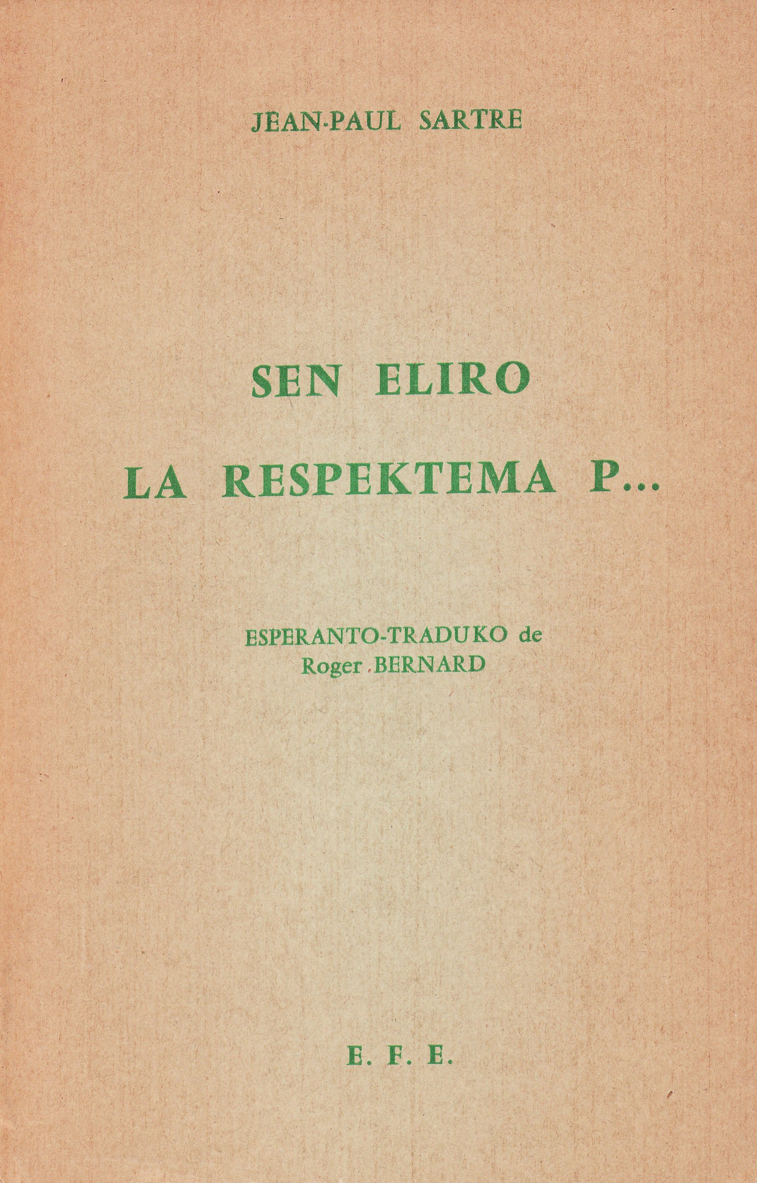 librokovrilo de "Sen Eliro & La Respektema P...", 1964